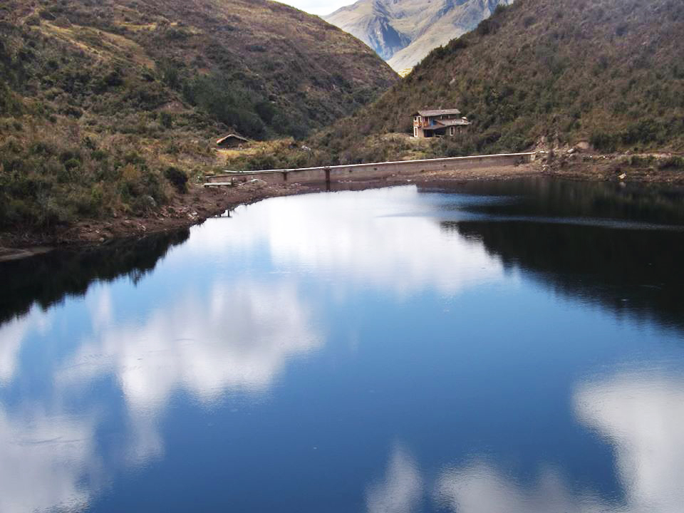 La captación de Patarcocha abastece de agua a toda la ciudad de Chacas.